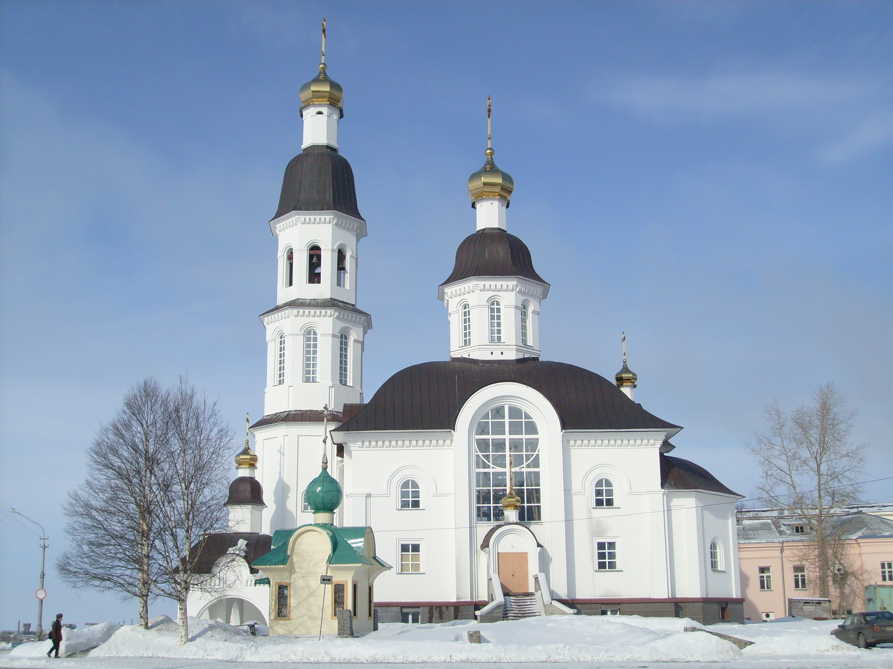 Успенская церковь и часовня Преподобного Антония Сийского. Архангельск